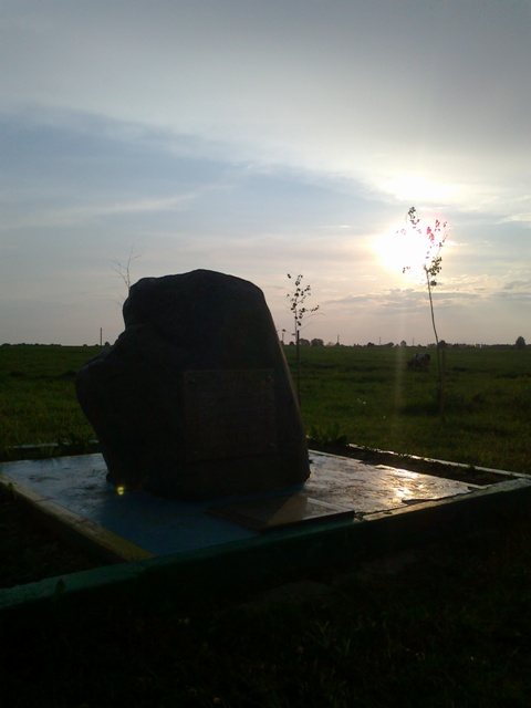 Галоўчын. Мемарыяльны Камень на месцы бою 1708 г.